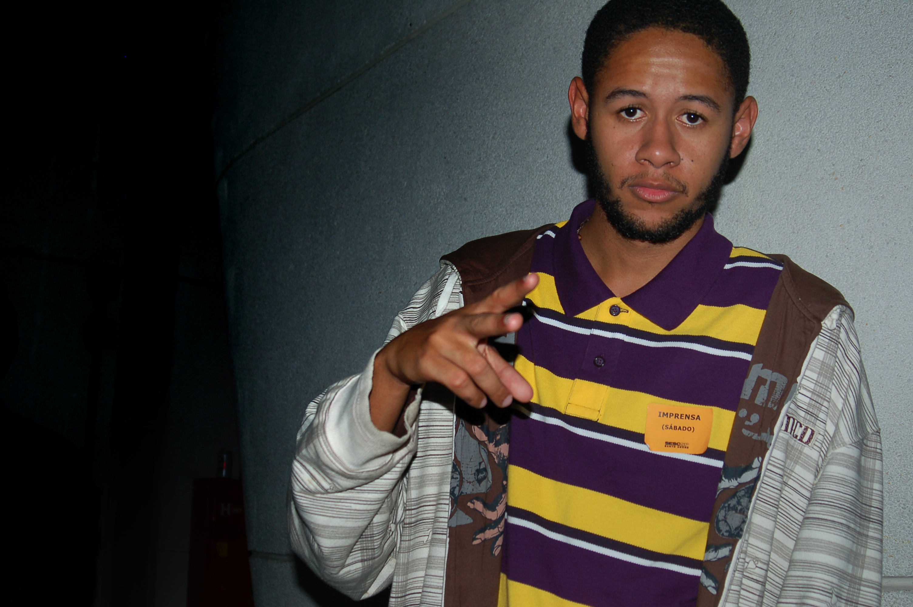 Indie Hip Hop '09 - 05.12